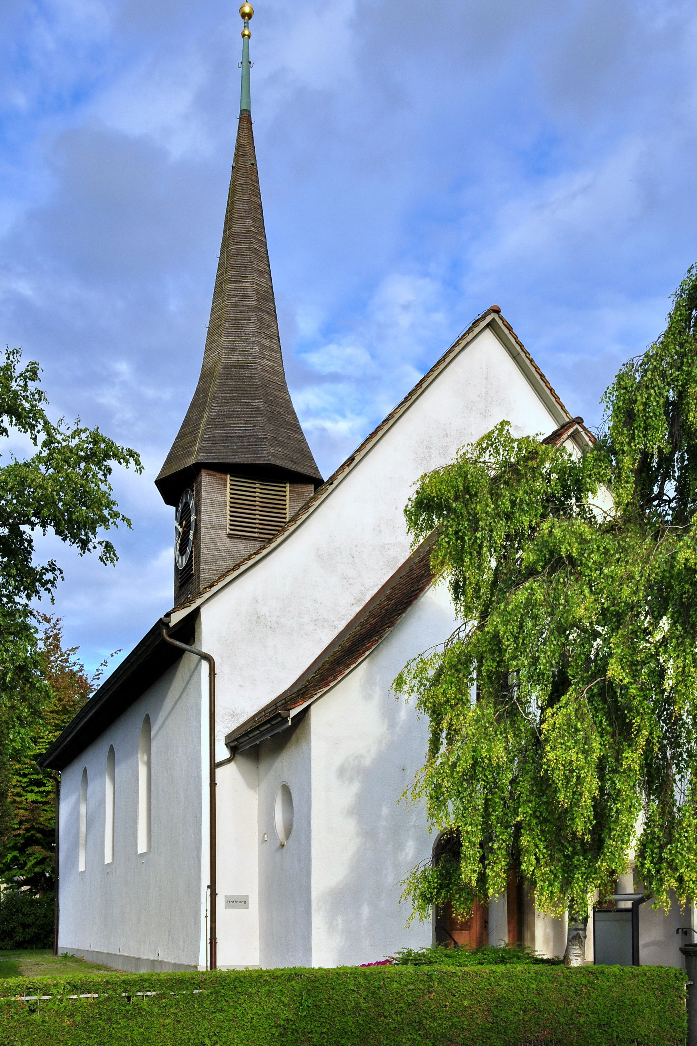 Reformierte Kirche in Zürich-Unteraffoltern (Switzerland)